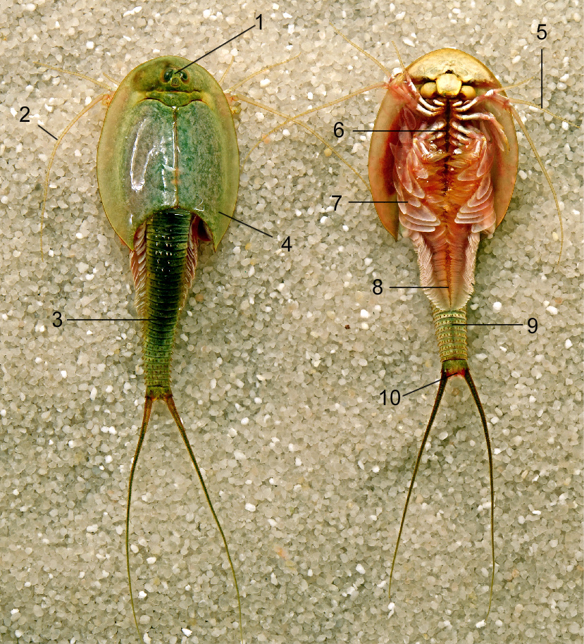 De Triop, buikaanzicht en rugaanzicht